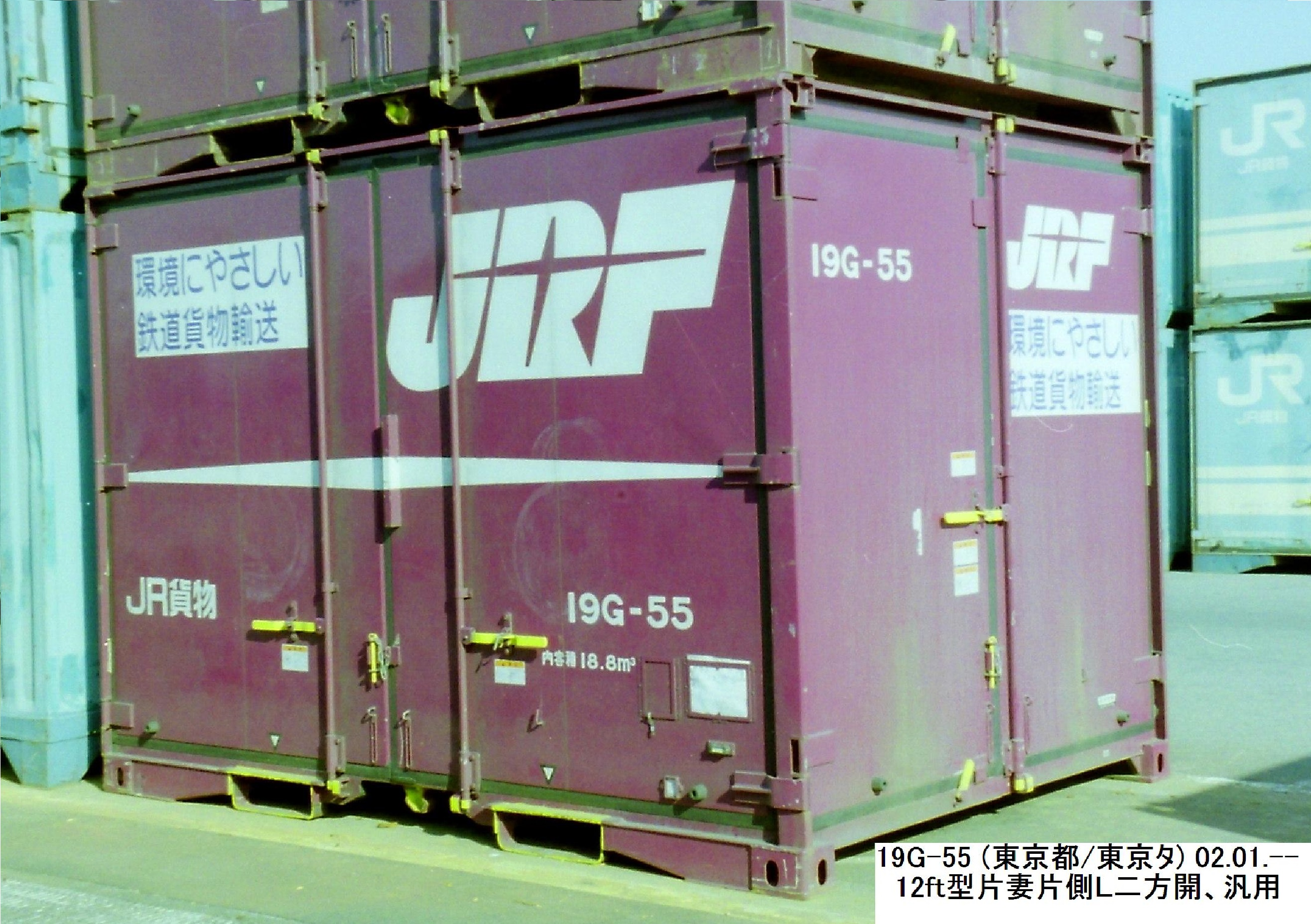 撮影地＝東京(タ)